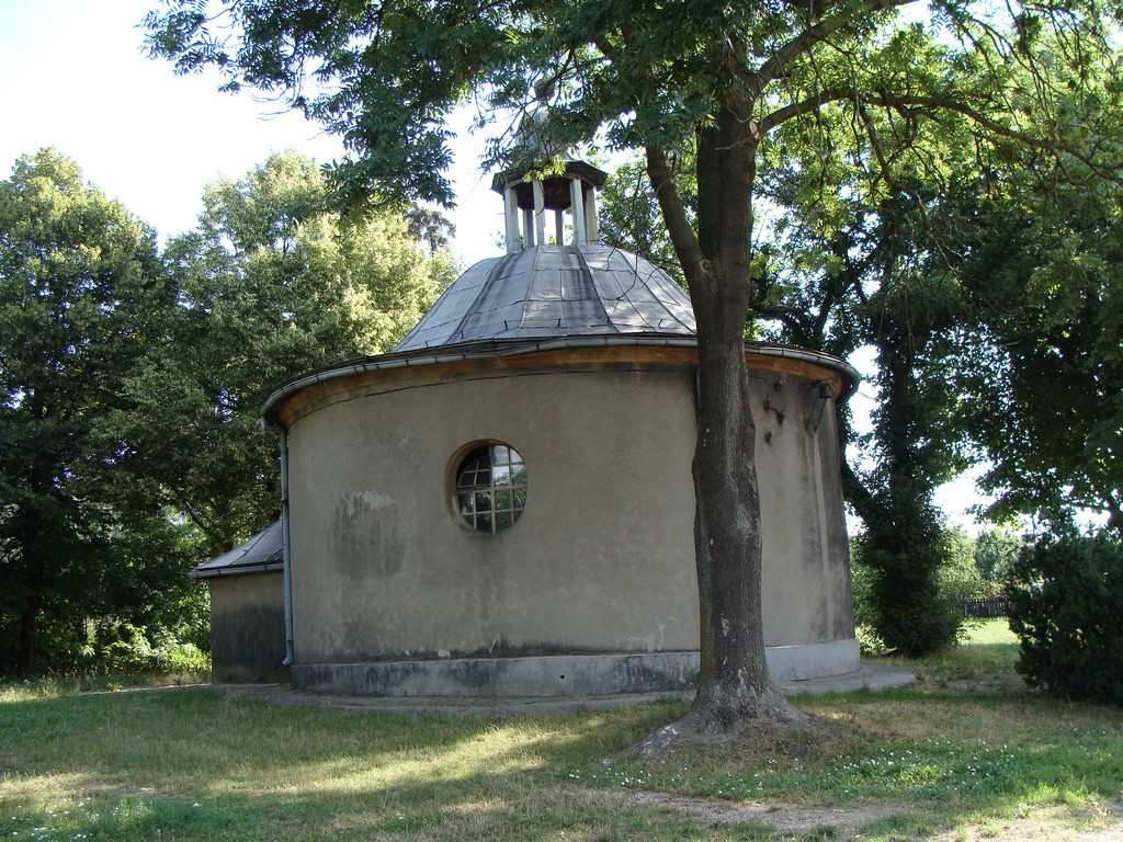 Manieczki - Kaplica